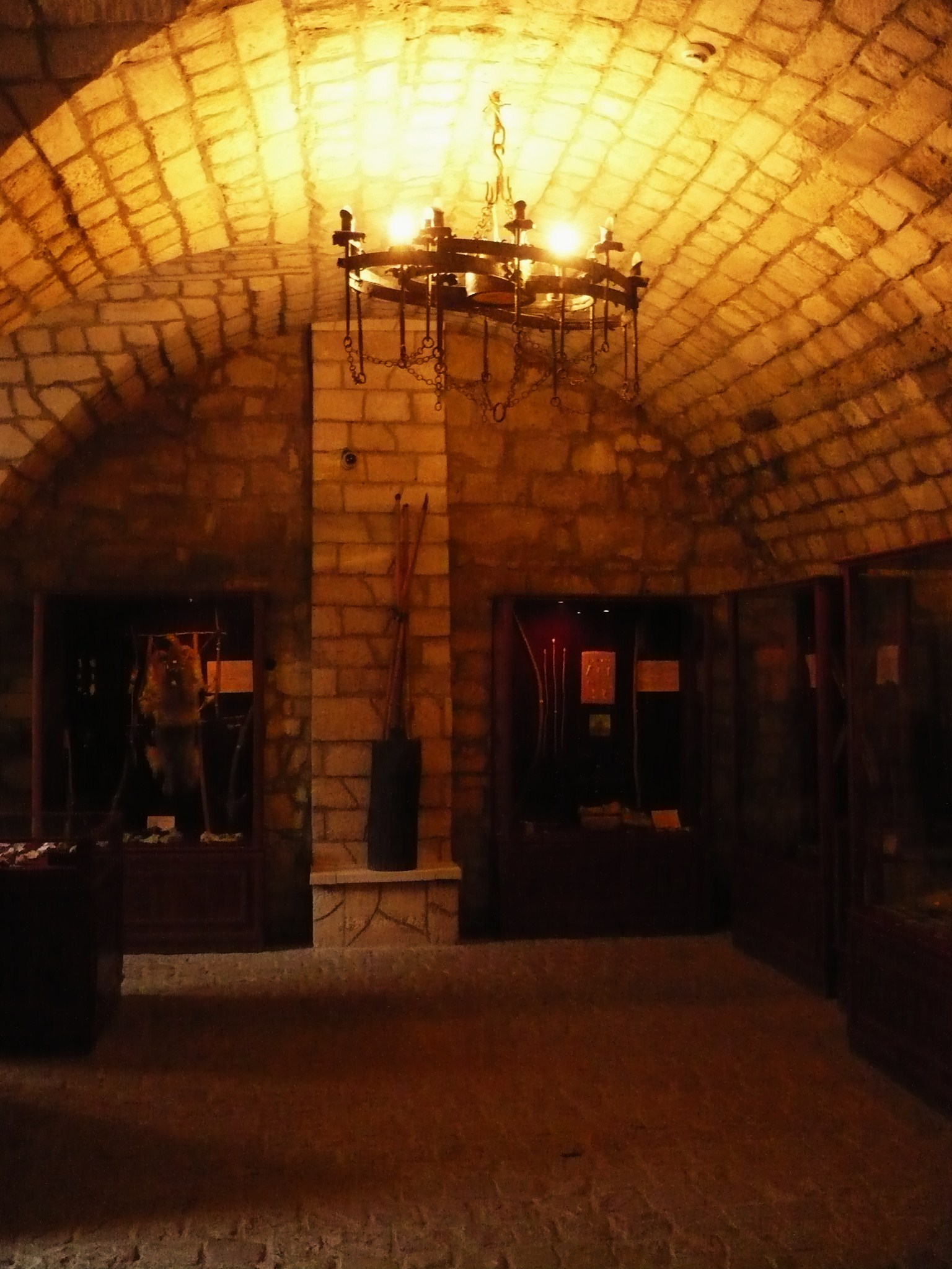 Zbaraż